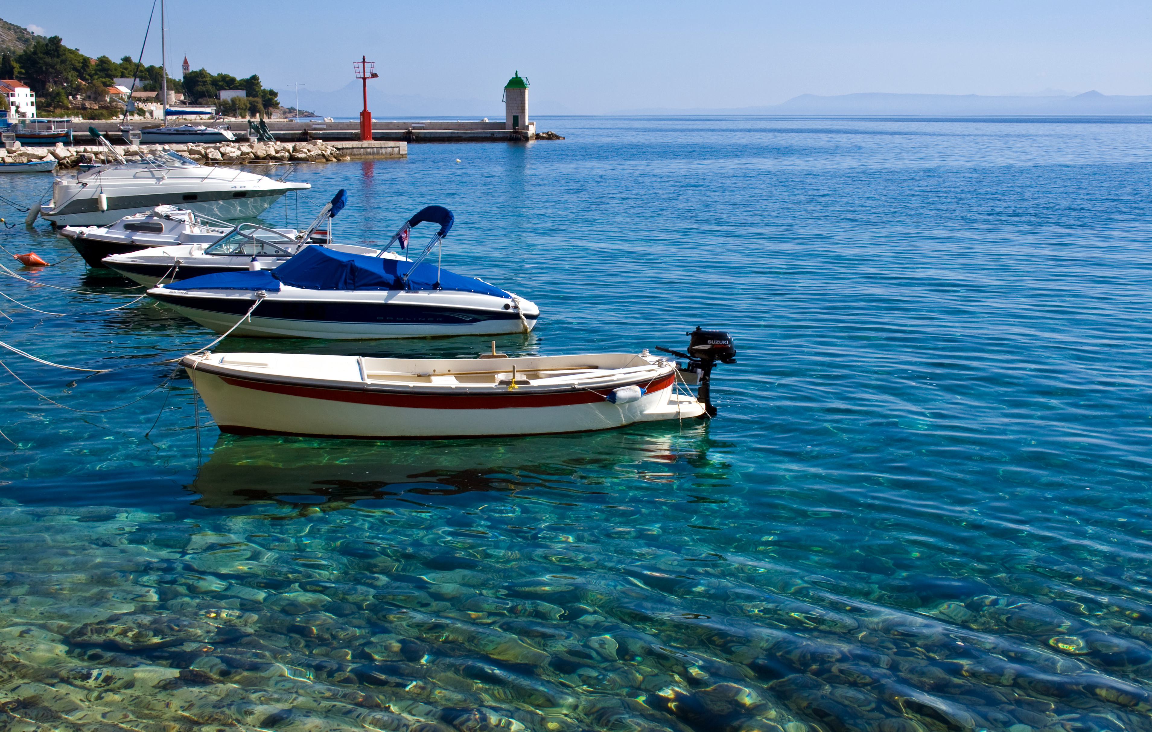 Insel Brač: Hafen Bol